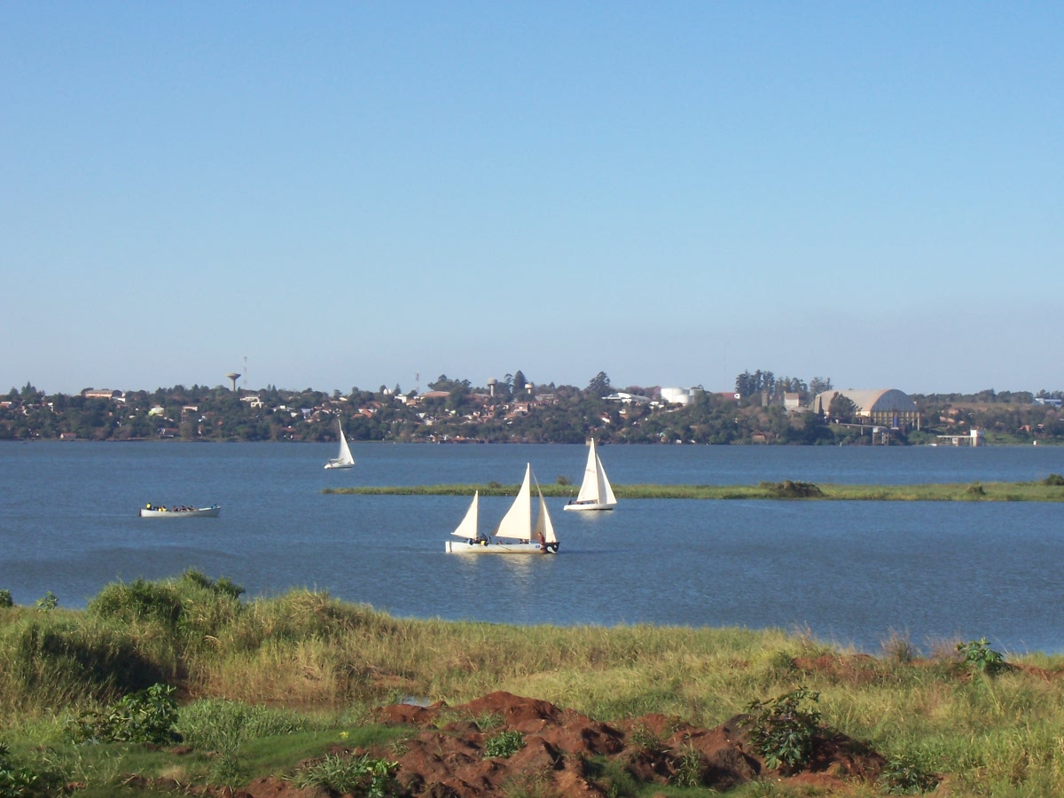 Vista de la ciudad de Encarnación (Paraguay), tomada desde Posadas, Argentina.